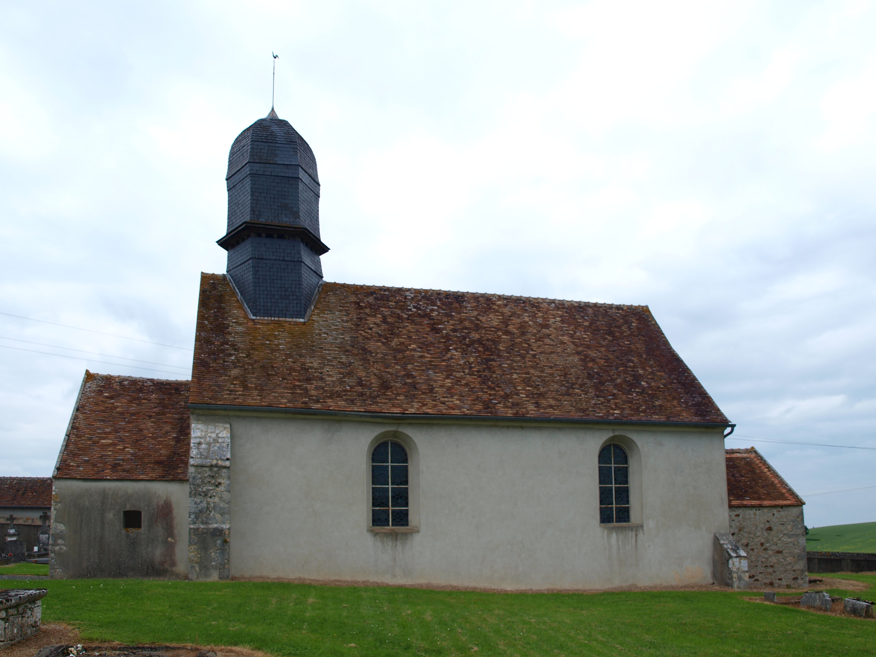 Saint-Loup-de-Gonois (Loiret, France) ; église